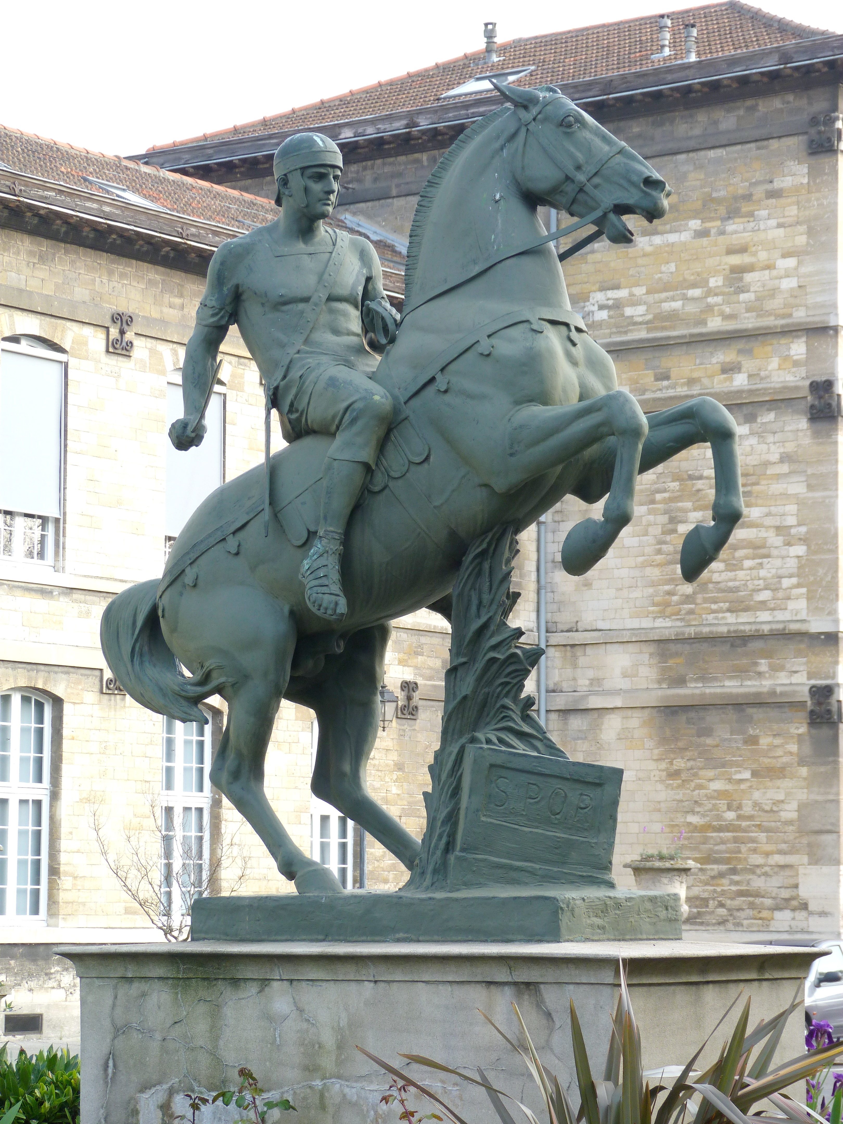 Gladiateur à cheval, bronze, 1866, Isidore Bonheur (1827–1901) - Fonte de 1902, leg à la Ville de Paris en 1909, placé dans la cour principale de l'hôpital Sainte-Anne à Paris (14e arrond.) en 1942.